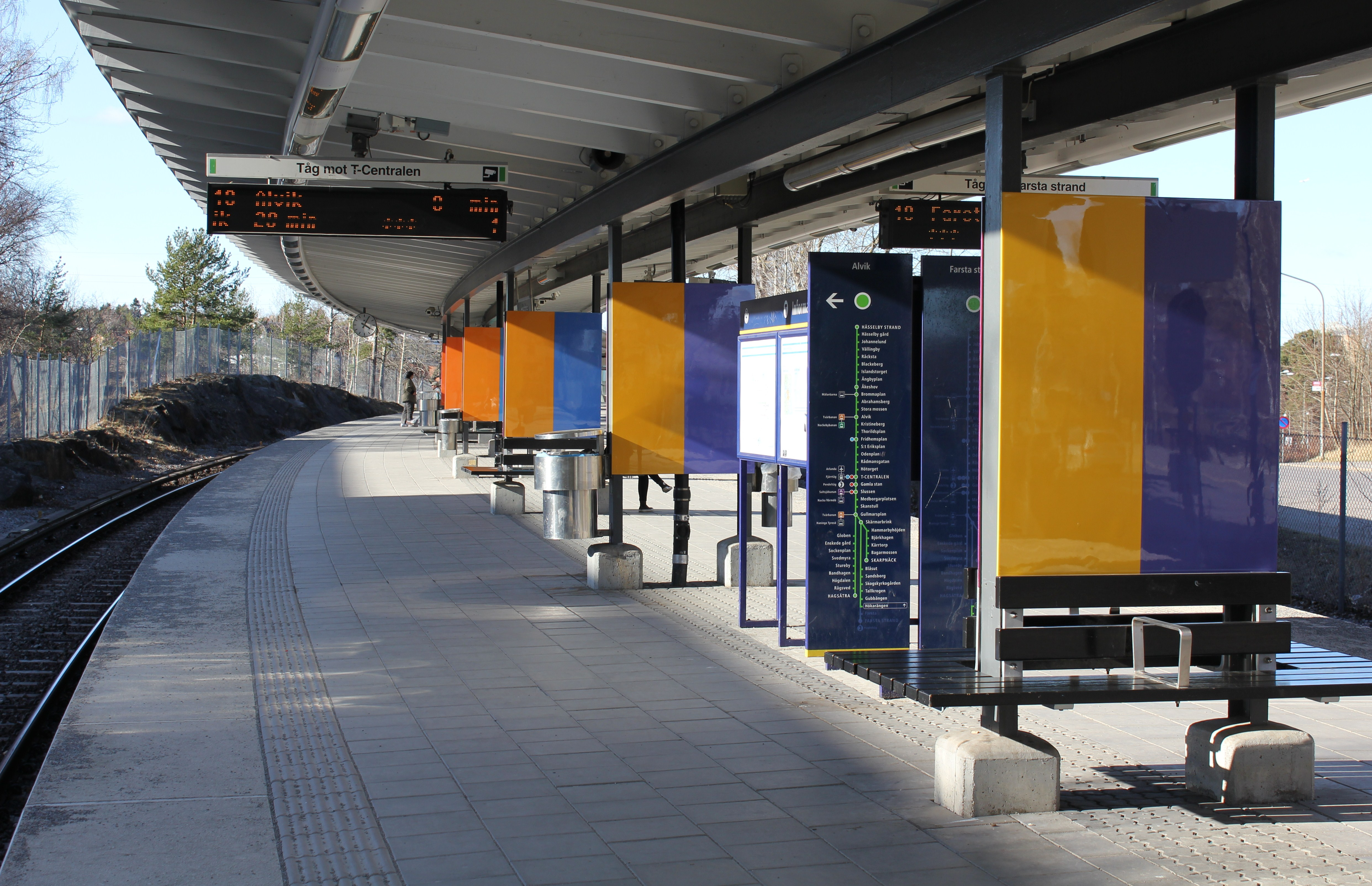 Hökarängens tunnelbanestation.